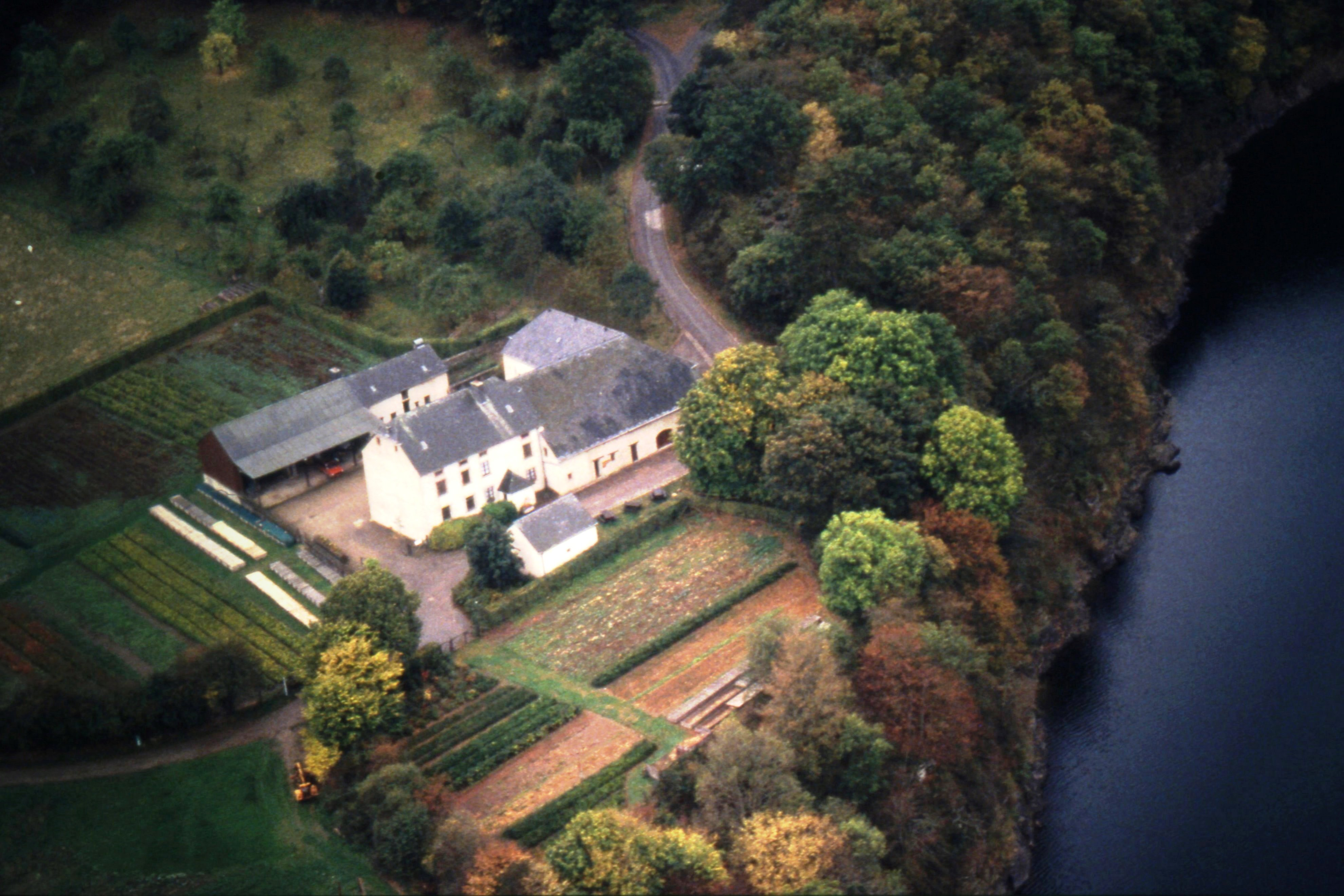 Le hameau luxembourgeois de Burfelt (Neunhausen) vu du ciel